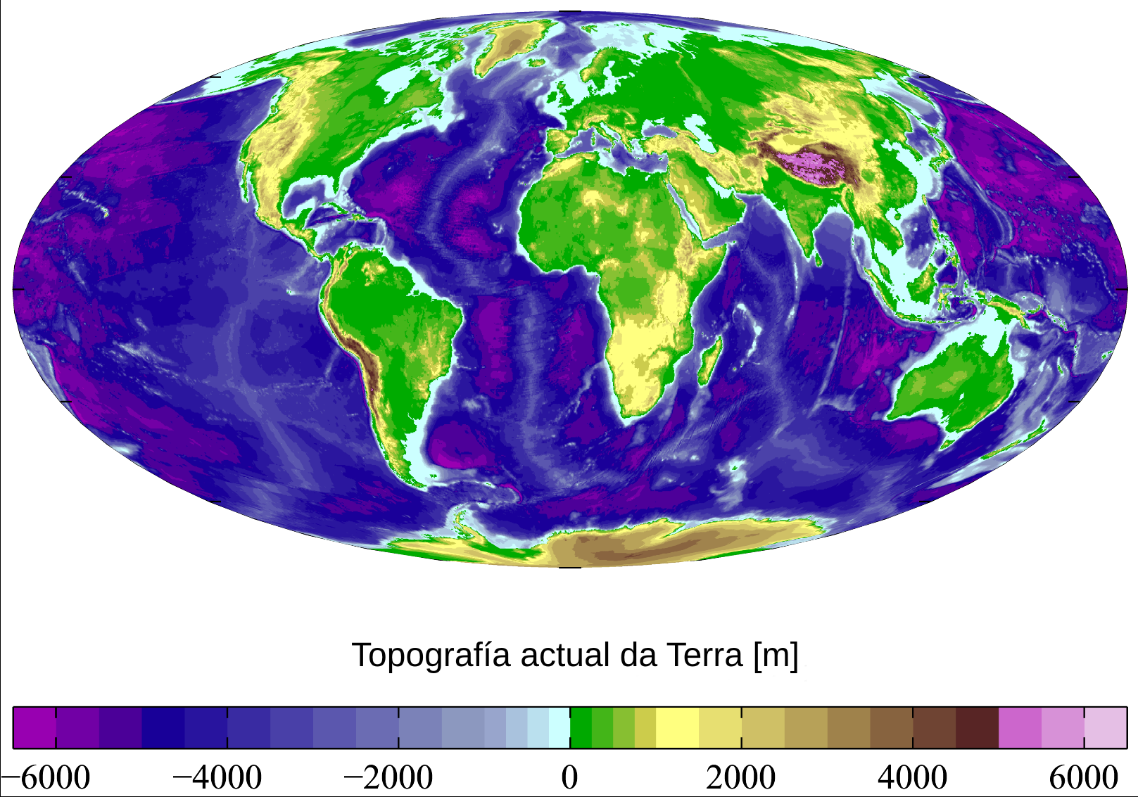 topografía da Terra e batimetría a resoulución horizontal de 15 min derivado do National Geophysical Data Center's TerrainBase Digital Terrain Mode